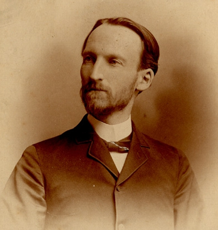 Nazaire-Nicolas Olivier